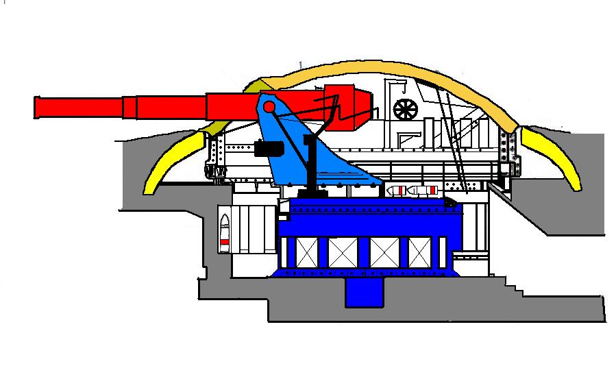 italienischer 149 mm Kanonenpanzerturm Typ Schneider